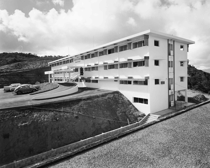 fachada